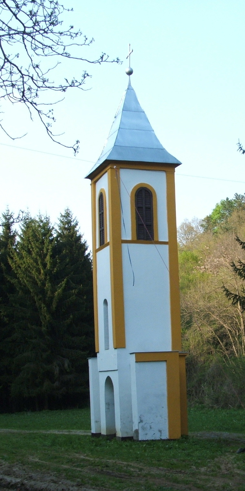 Bátaapátitól 2,5 km-re délre, az elpusztult Üveghuta helyén lévő kápolna